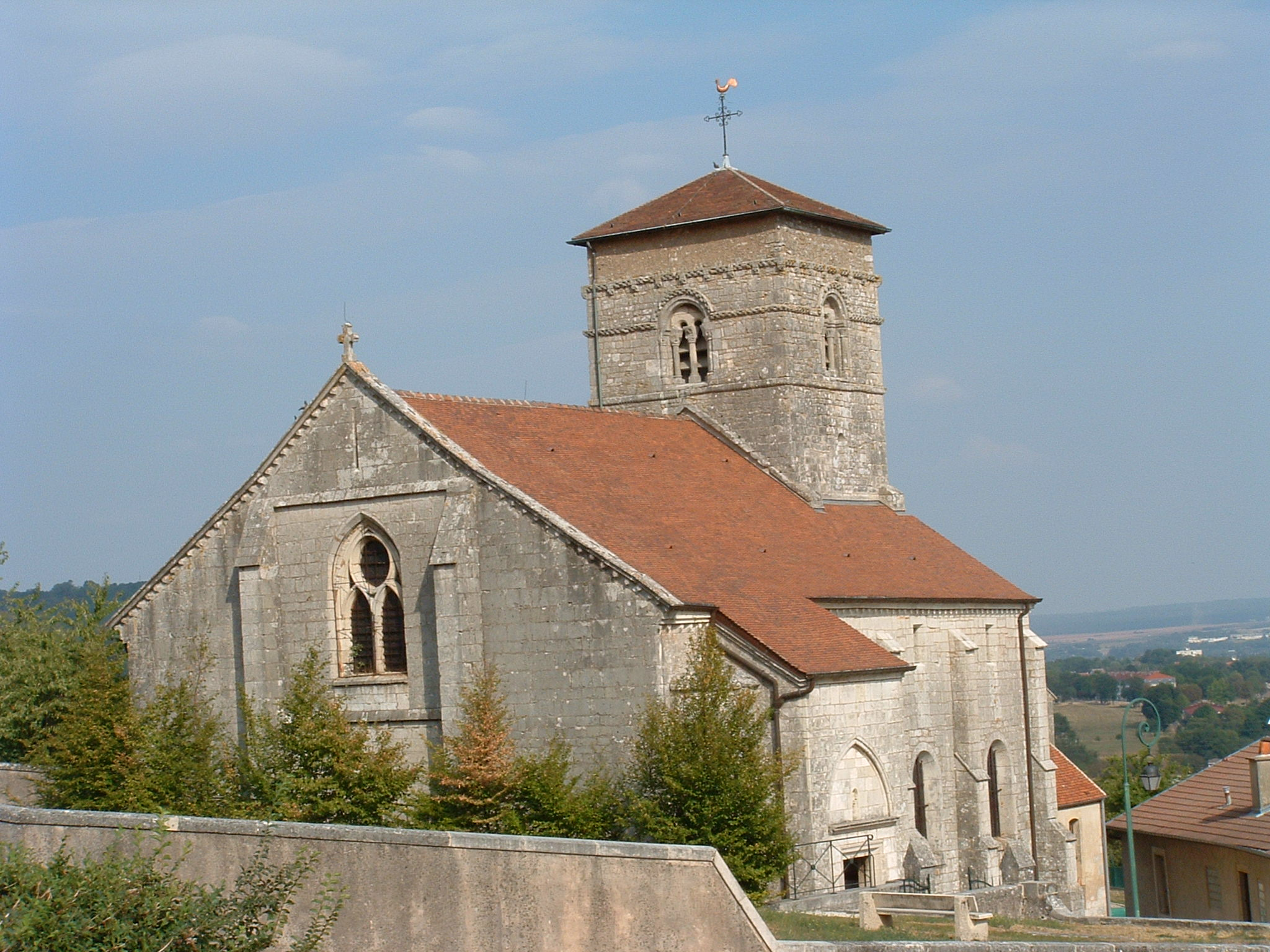 Eglise d'Ecrouves